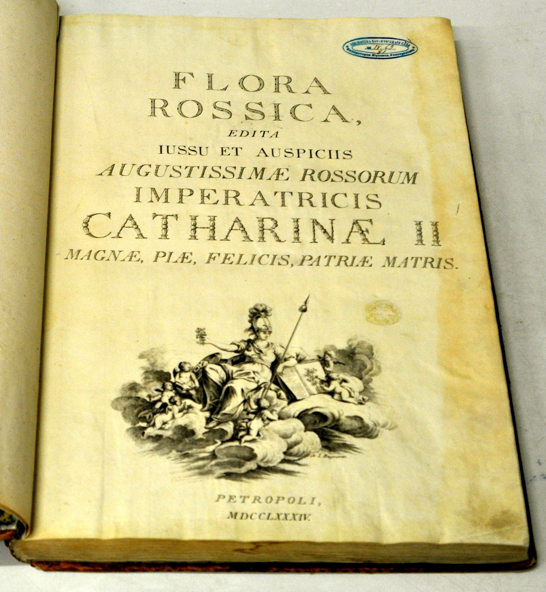 Saksa botaaniku Peter Simon Pallase poolt koostatud Venemaa taimede Flora. Ilmunud aastal 1784.